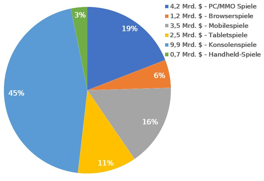 Diese Grafik zeigt den Spielemarktumsatz im Jahr 2015 der Vereinigten Staaten unterteilt nach Endgerät-Art (z.B. Konsole, Computer, Smartphone, ...) Die Daten für die Grafik stammen aus dem englischen Artikel und sind in die Deutsche Sprache überführt worden. Die Schriftart in der Grafik ist Dejavu-Sans.